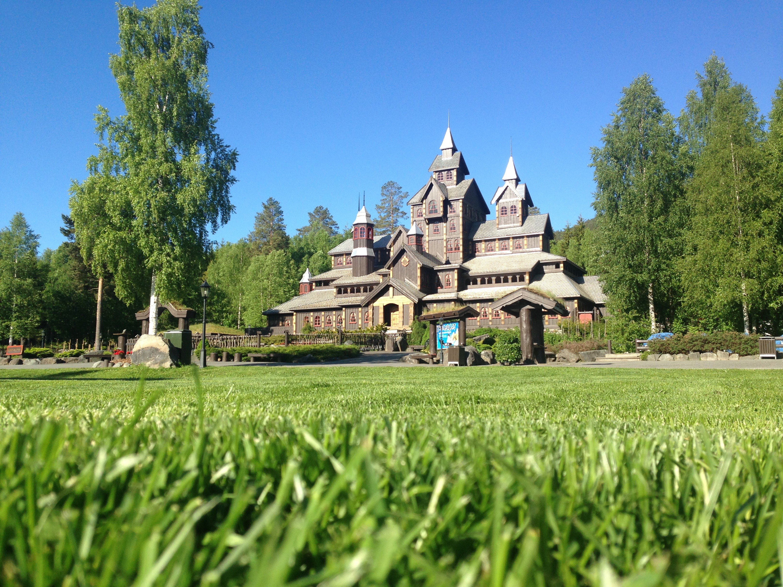 Slottet er 35 meter høyt og har en grunnflate på 1 200 m2, utvendige detaljer som tårn, karnapper, svalganger og spir. Slottet har 110 vinduer og 468 roseornamenter på 176 søyler.